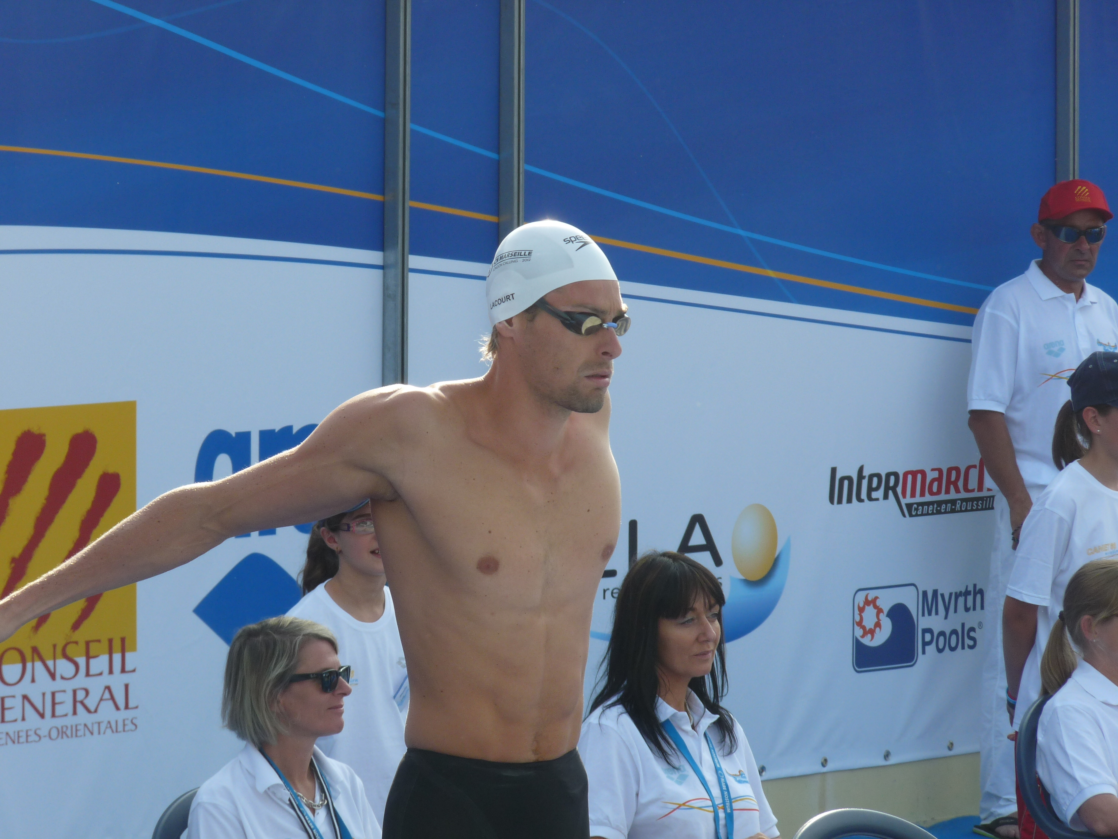 C LACOURT